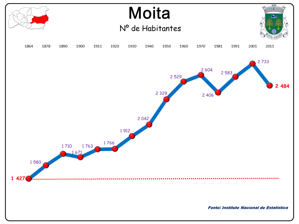 Freguesia